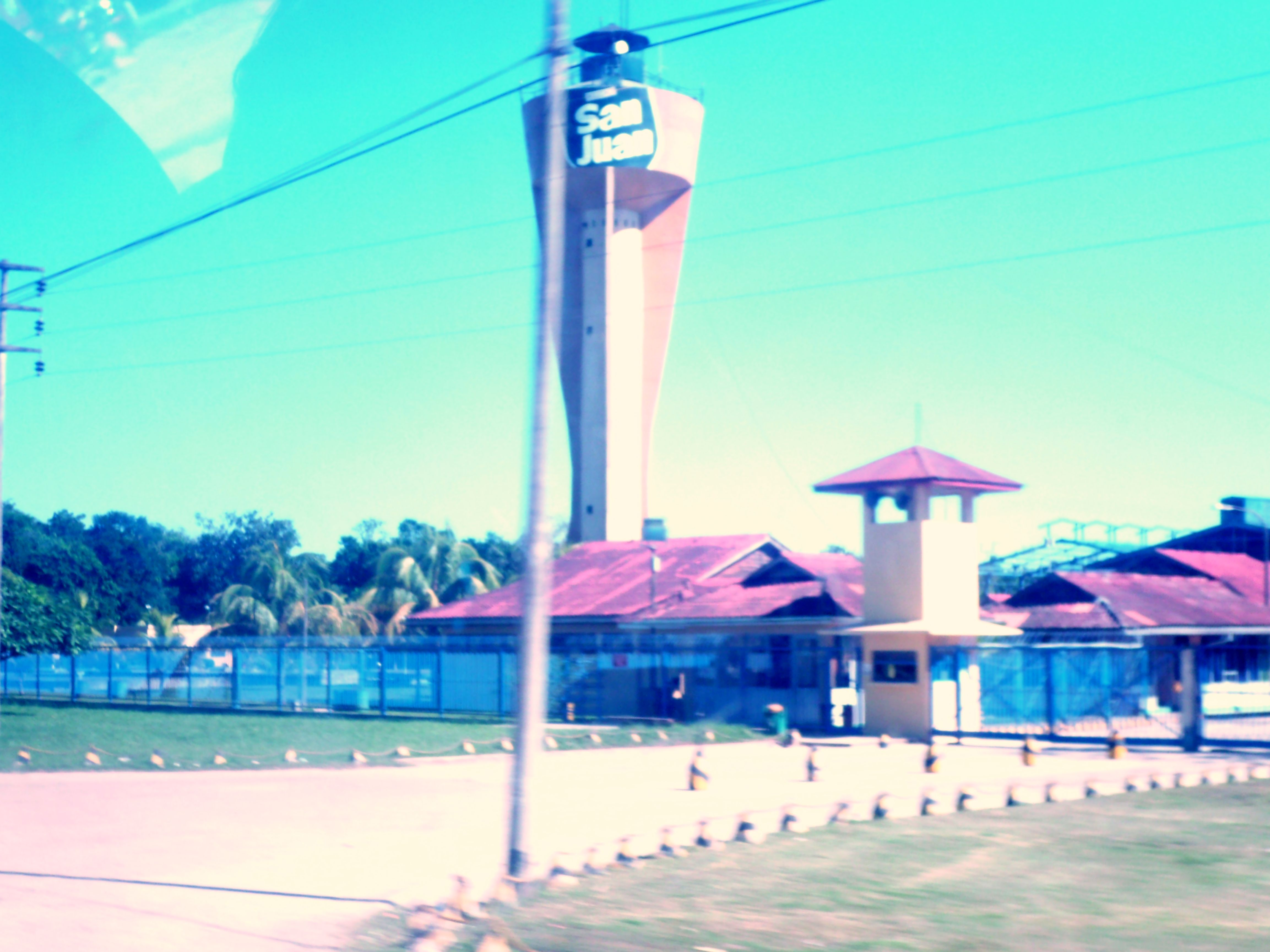 La sede de la cervecería San Juan (de la Unión de Cervecerías Peruanas Backus y Johnston) a 12 kilómetros de Pucallpa — Perú.